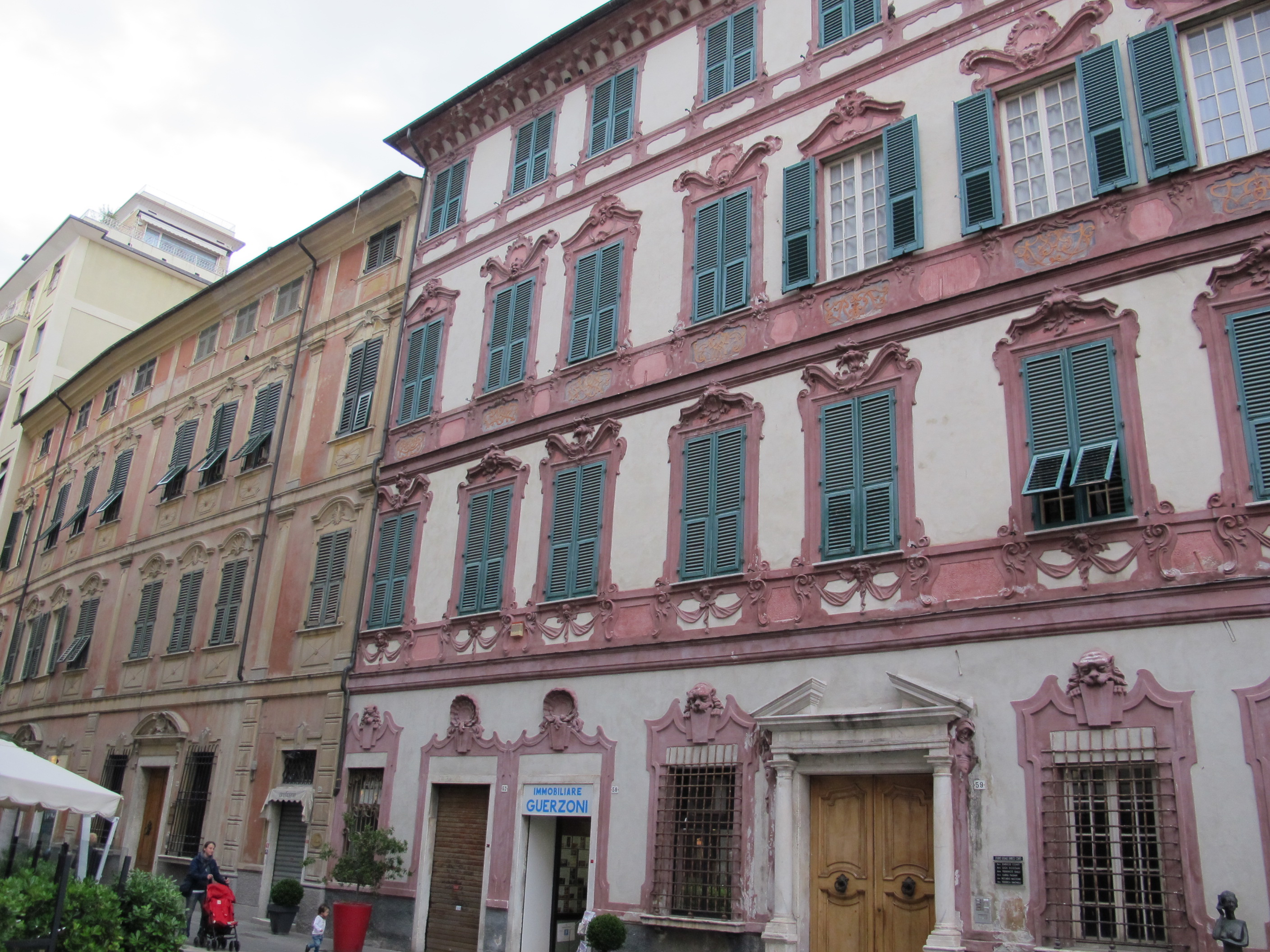 La spezia, sant'agostino